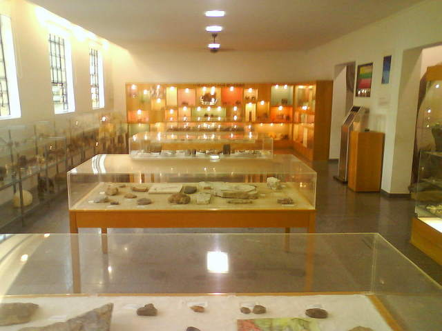 Museu Geológico Valdemar Lefèvre, no Parque da Água Branca, São Paulo, Brasil.